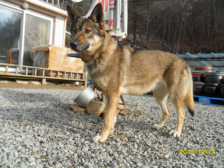 늑대아빠가 키우는 울프독